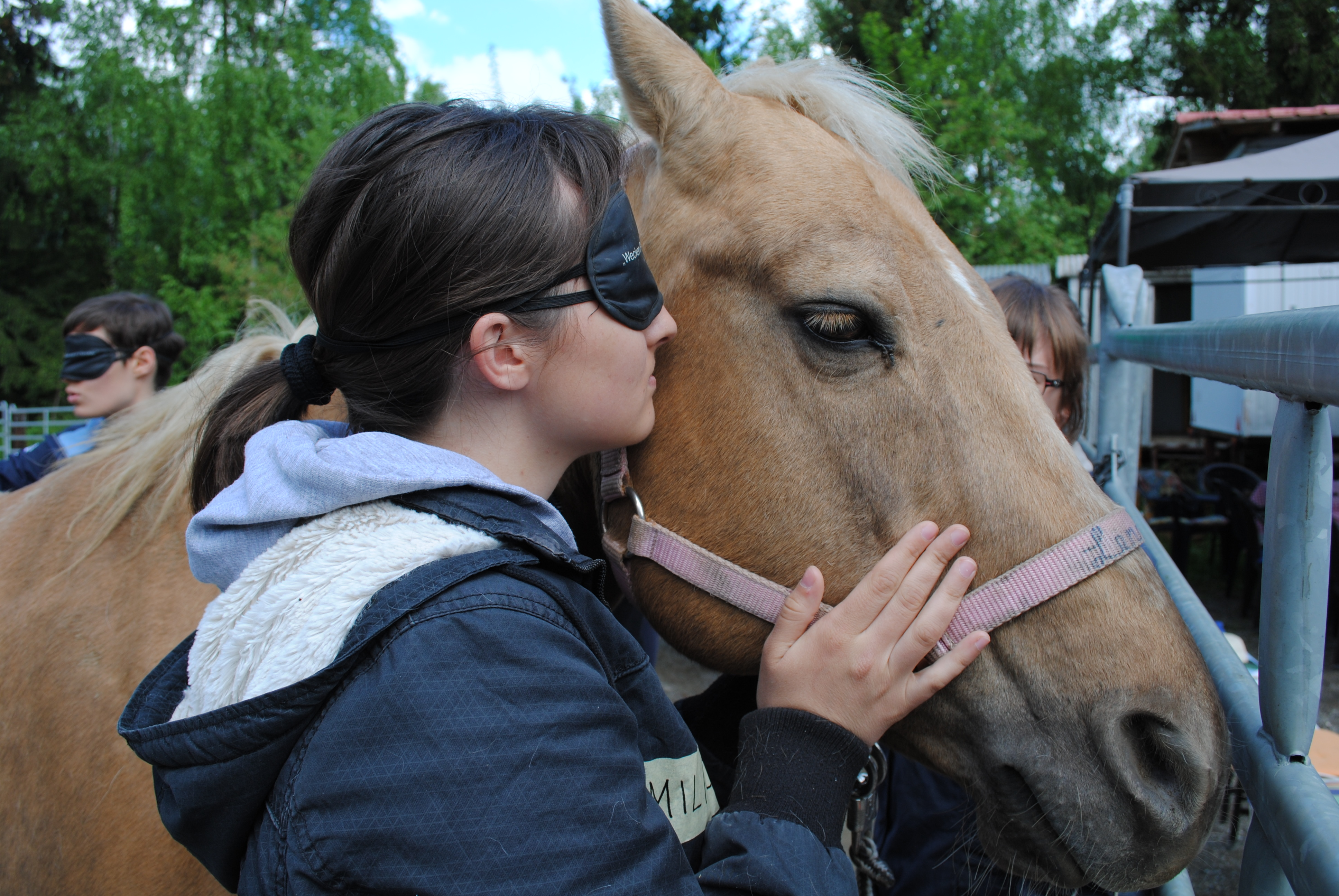 Терапијско јахање уз помоћ коња